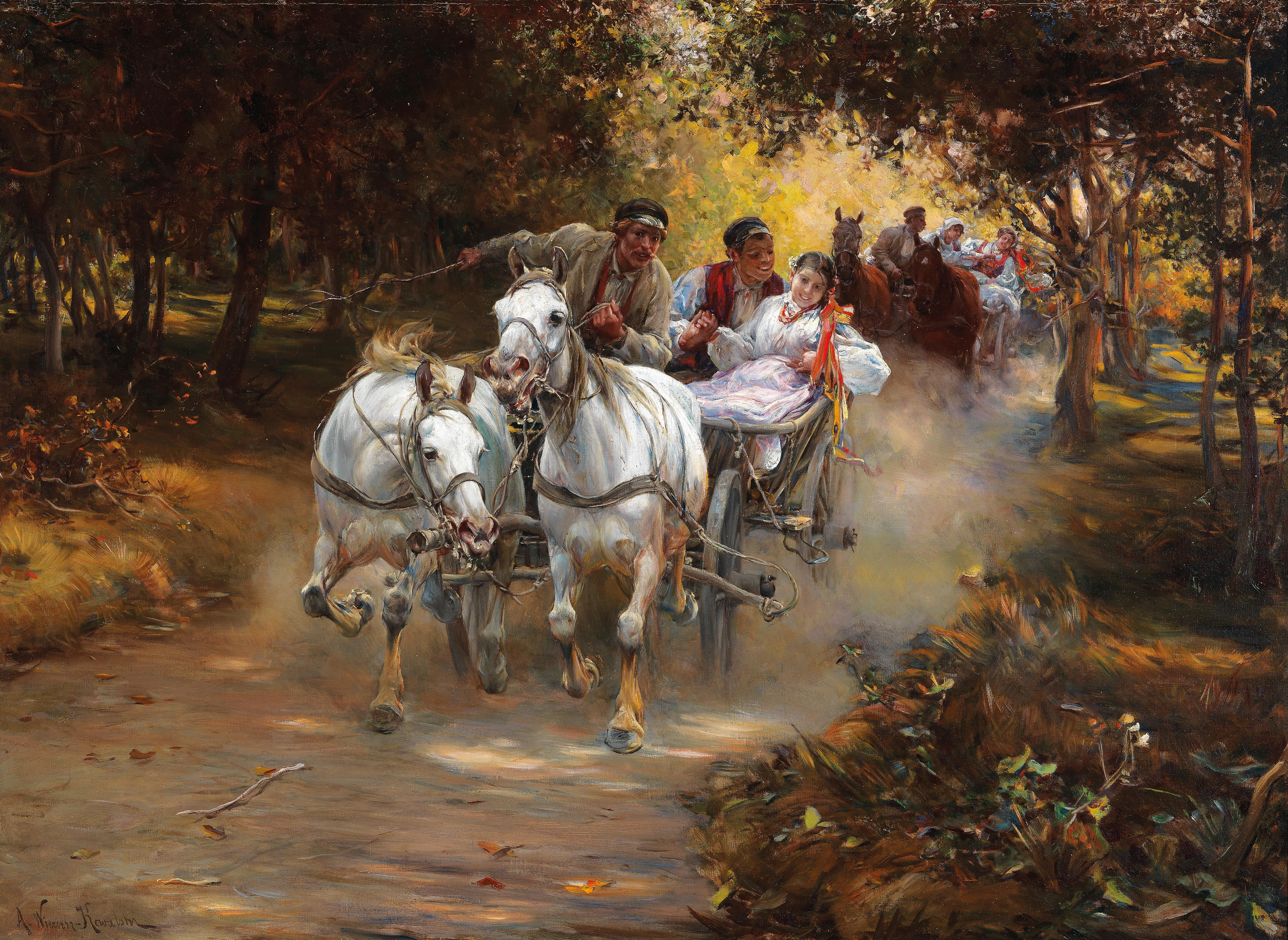 Bauernhochzeit, signiert A. Wierusz-Kowalski, Öl auf Leinwand, 79 x 107 cm